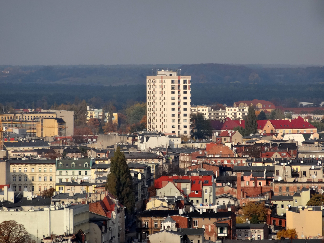 Widok z wieży ciśnień w Bydgoszczy w kierunku północnym (Nordic Tower, Bocianowo)